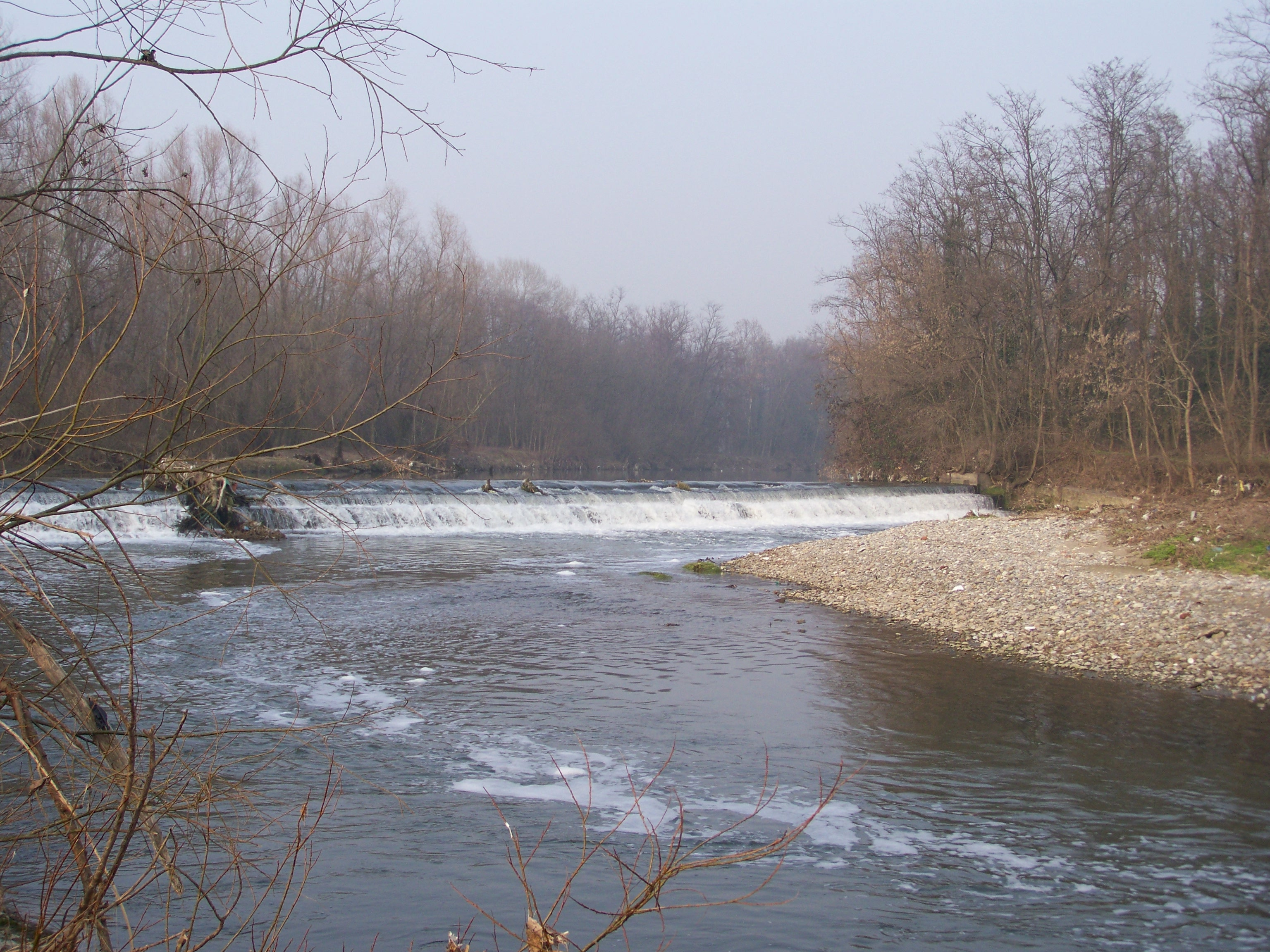 Fiume Mella presso cigole